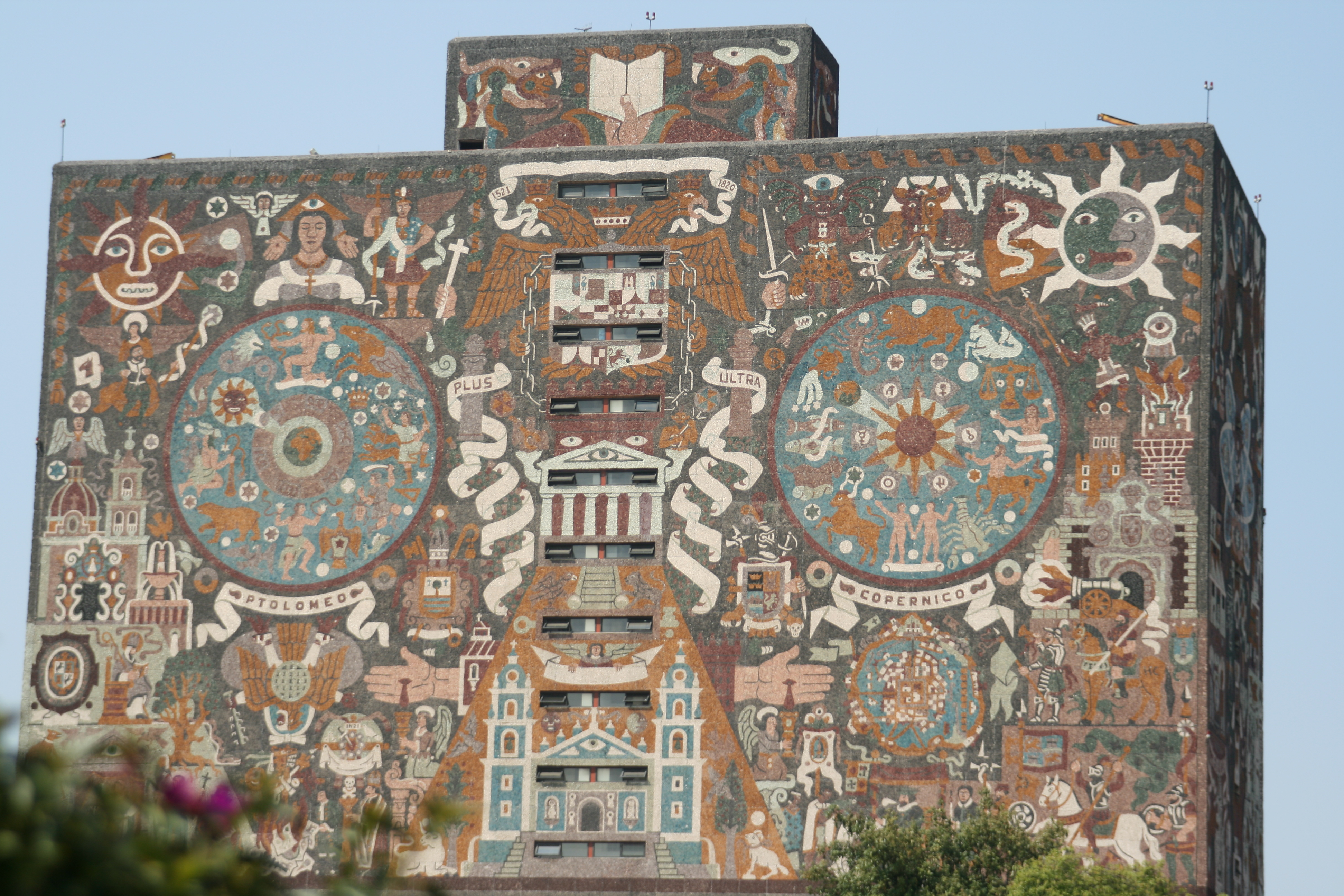 Es hermoso ese edificio, me imagino que también es uno de los más fotografiados de toda Ciudad Universitaria.